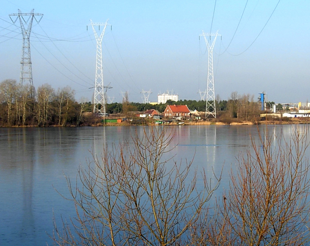 Tor regatowy w Brdyujściu w Bydgoszczy